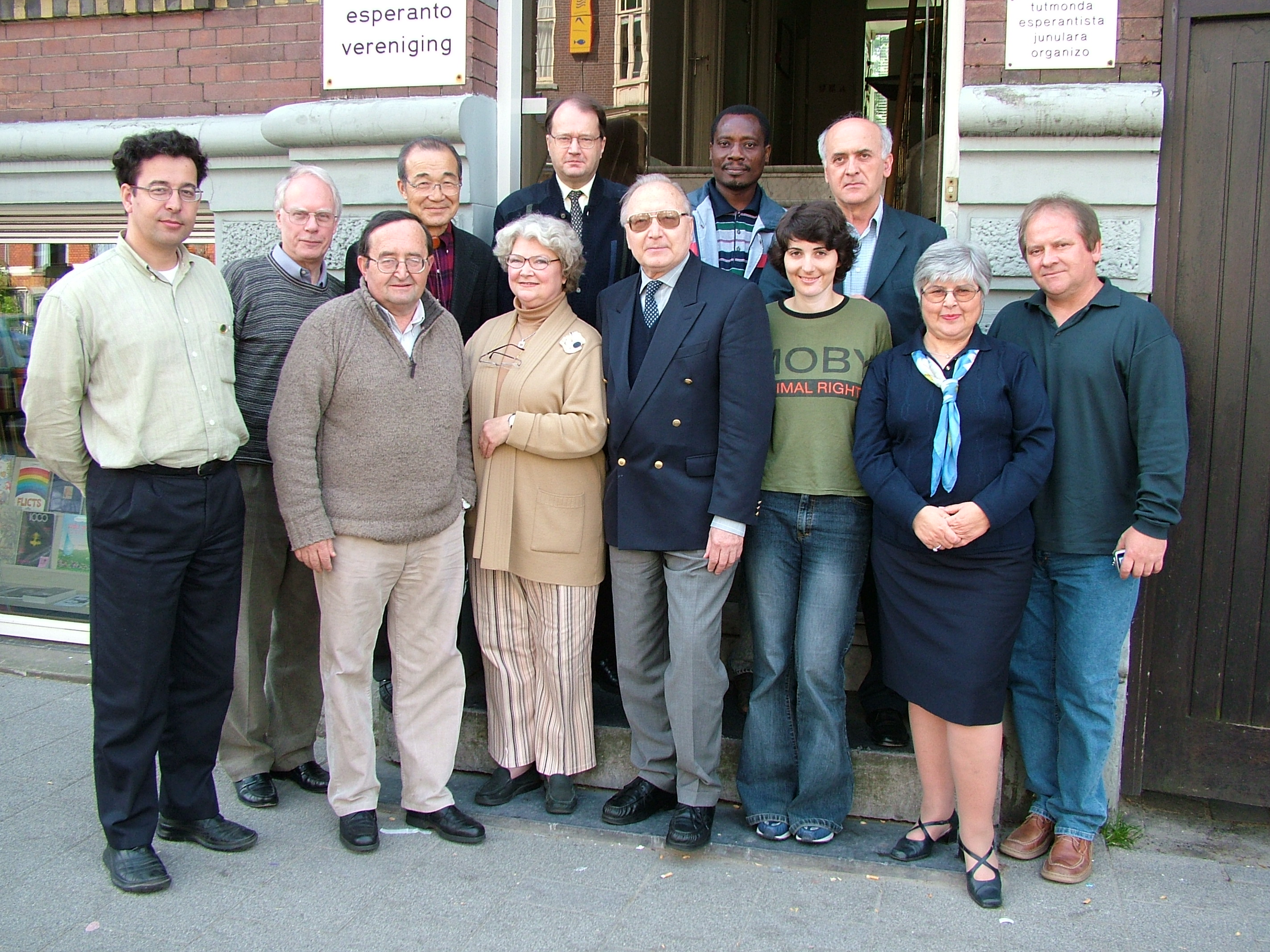 Estraro de Universala Esperanto-Asocio, aprilo 2004, antaŭ la Centra Oficejo. De maldekstre: Andrej Grigorjevski, Humphrey Tonkin, Renato Corsetti, Lee Chong-Yeong, Ans Bakker, ĝenerala direktoro Osmo Buller, Ivo Osibov, Gbeglo Koffi, reprezentanto de TEJO Sonja Petroviĉ, reprezentanto de ILEI Radojica Petroviĉ, Michela Lipari, redaktoro Stano Marĉek